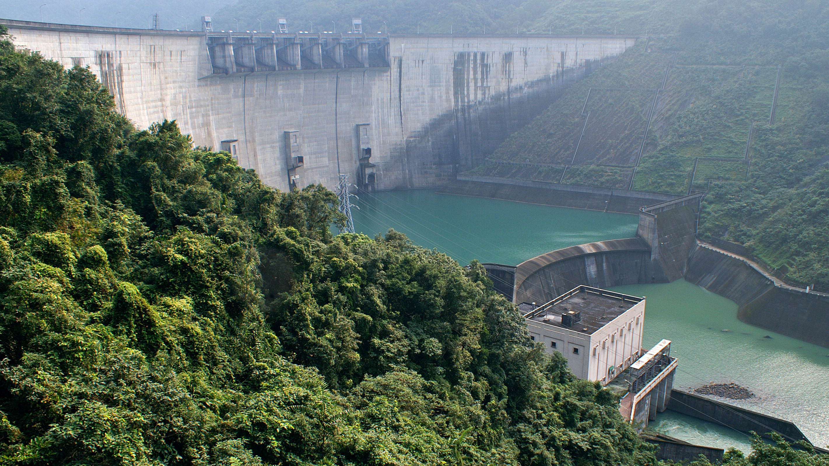 翡翠水庫 Feitsui Dam,Taipei,Taiwan